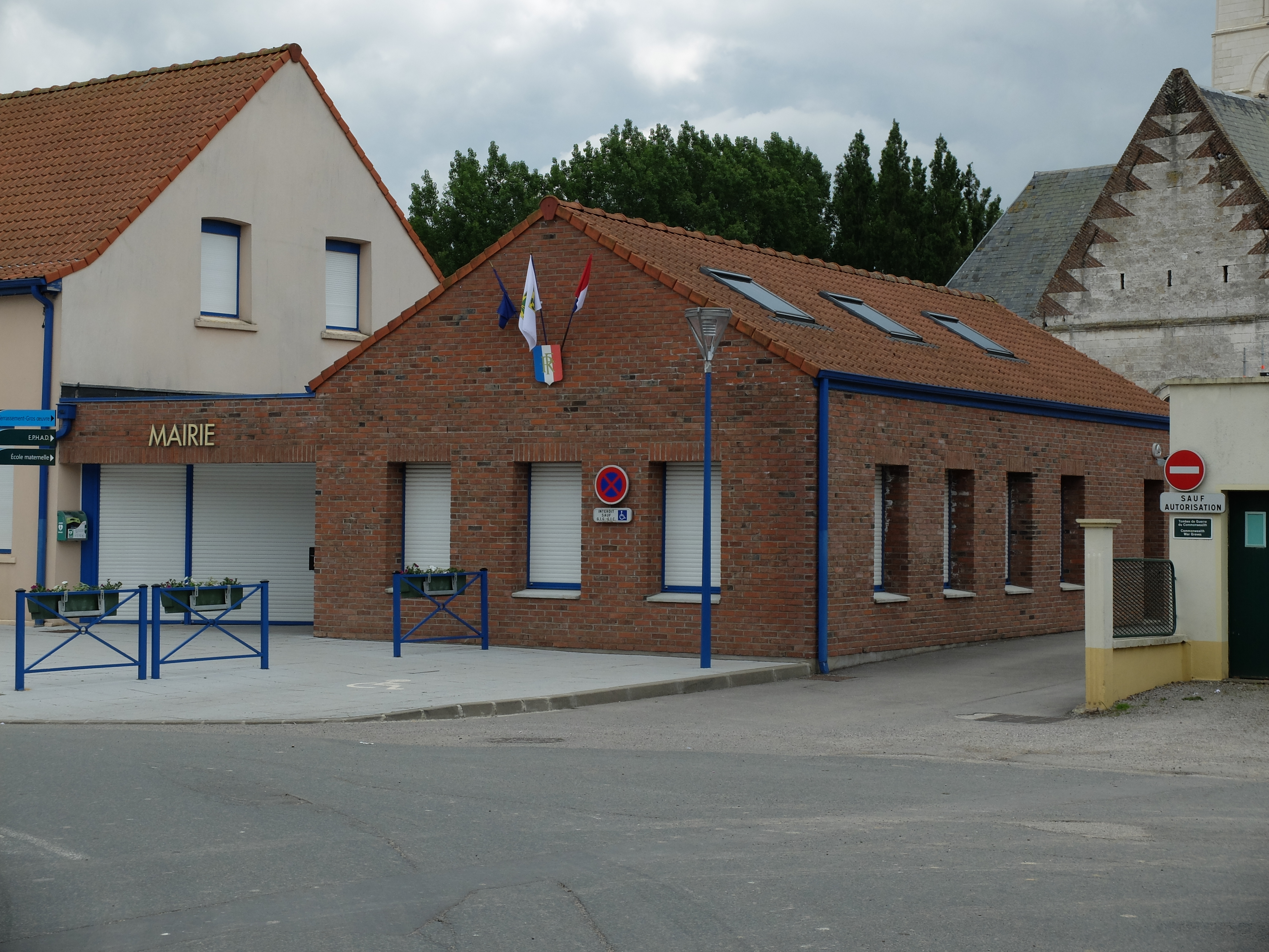 Vue de la mairie d'Ecques.